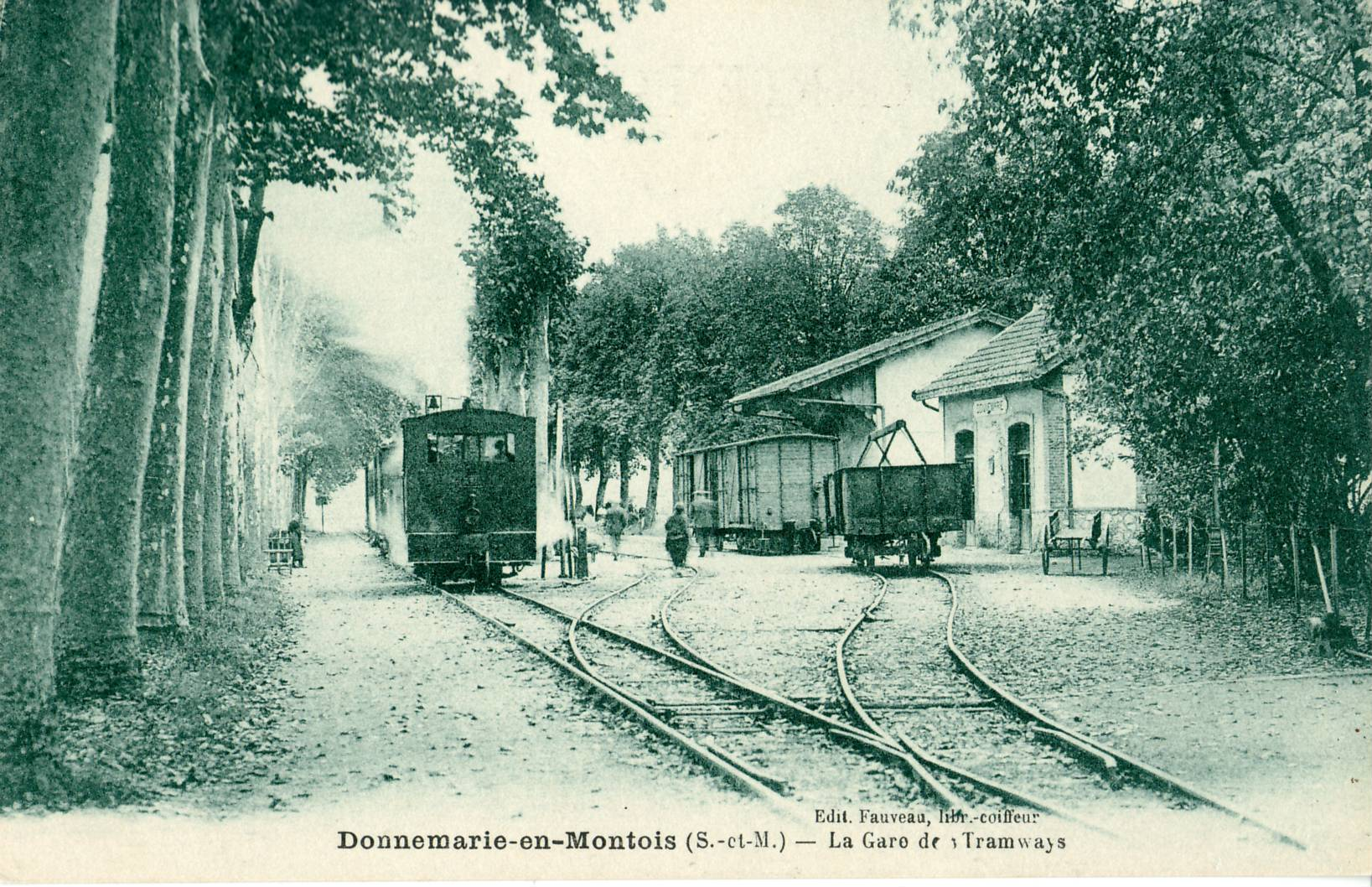 Carte postale ancienne éditée par Fauveau, libraire-coiffeur : Donnemarie-en-Montois - La Gare des Tramways.Ligne Jouy-le-Châtel - Bray-sur-Seine des Chemins de fer départementaux de Seine-et-Marne (Réseau SE)